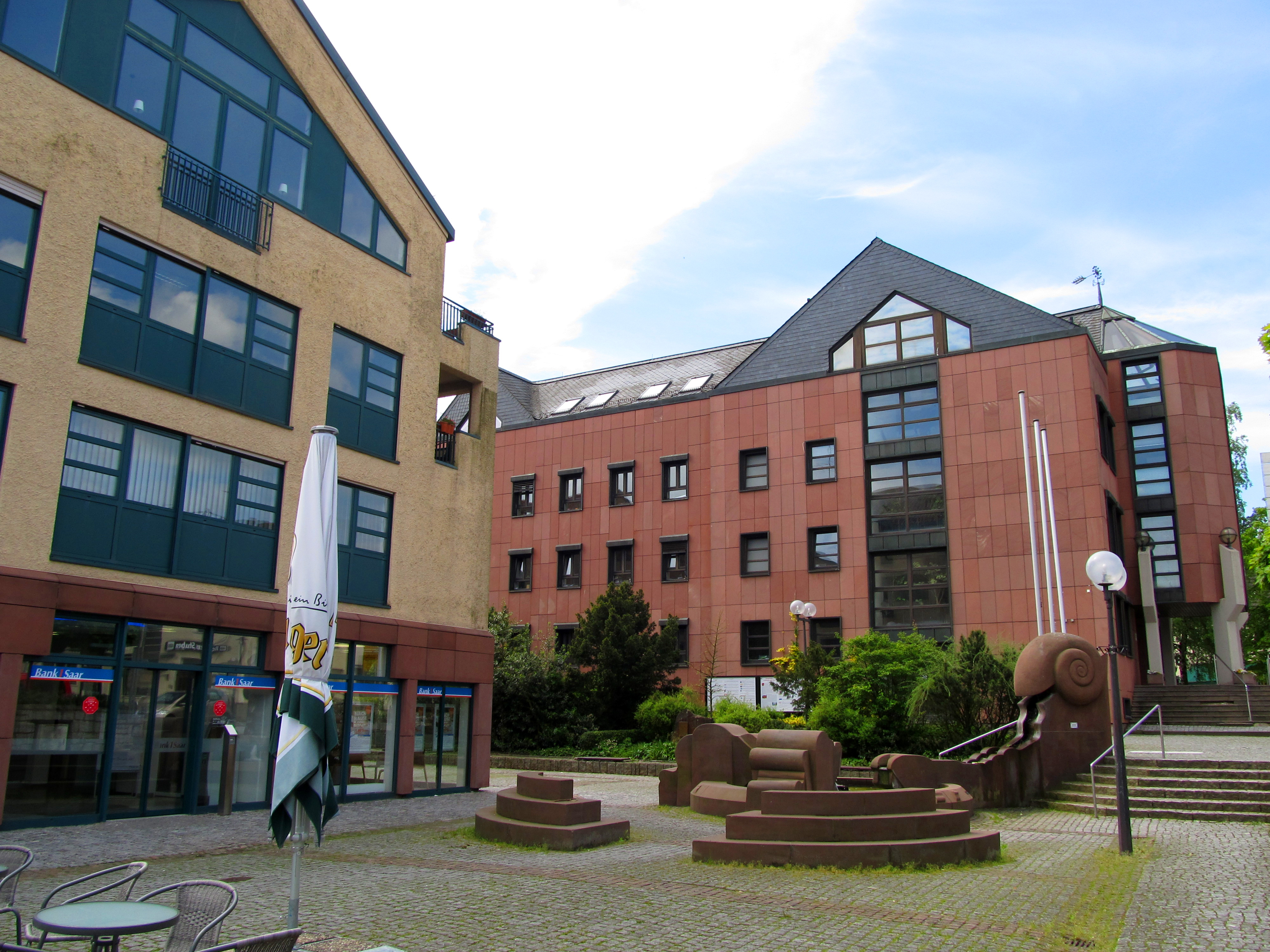 Gebäude im Zentrum von Losheim, Gemeinde Losheim am See, Kreis Merzig-Wadern, Saarland